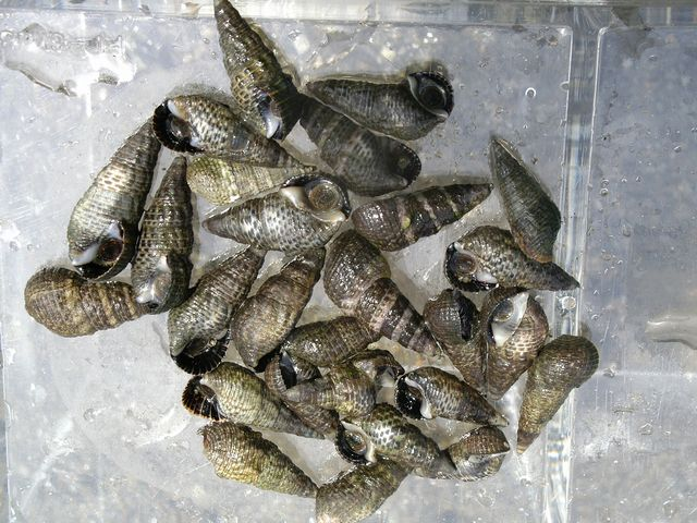 ウミニナ。長崎県西海市(Batillaria multiformis,in Saikai,Nagasaki)